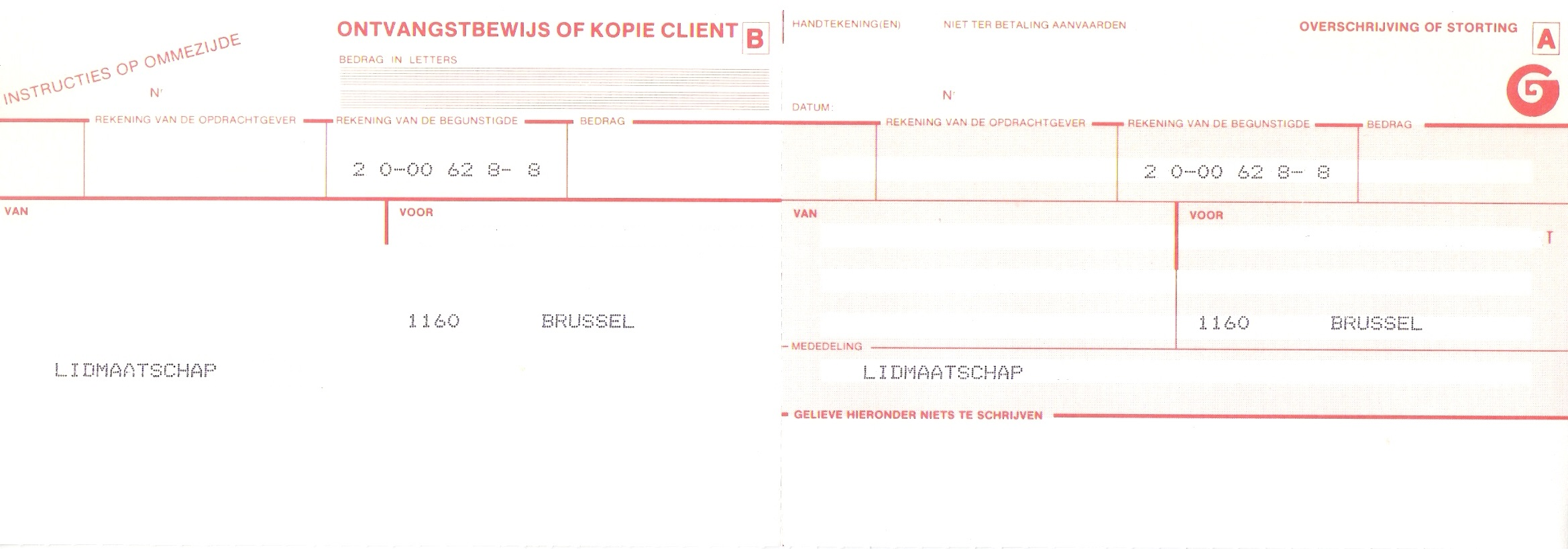 Belgisch overschrijvingsformulier in Belgische Frank